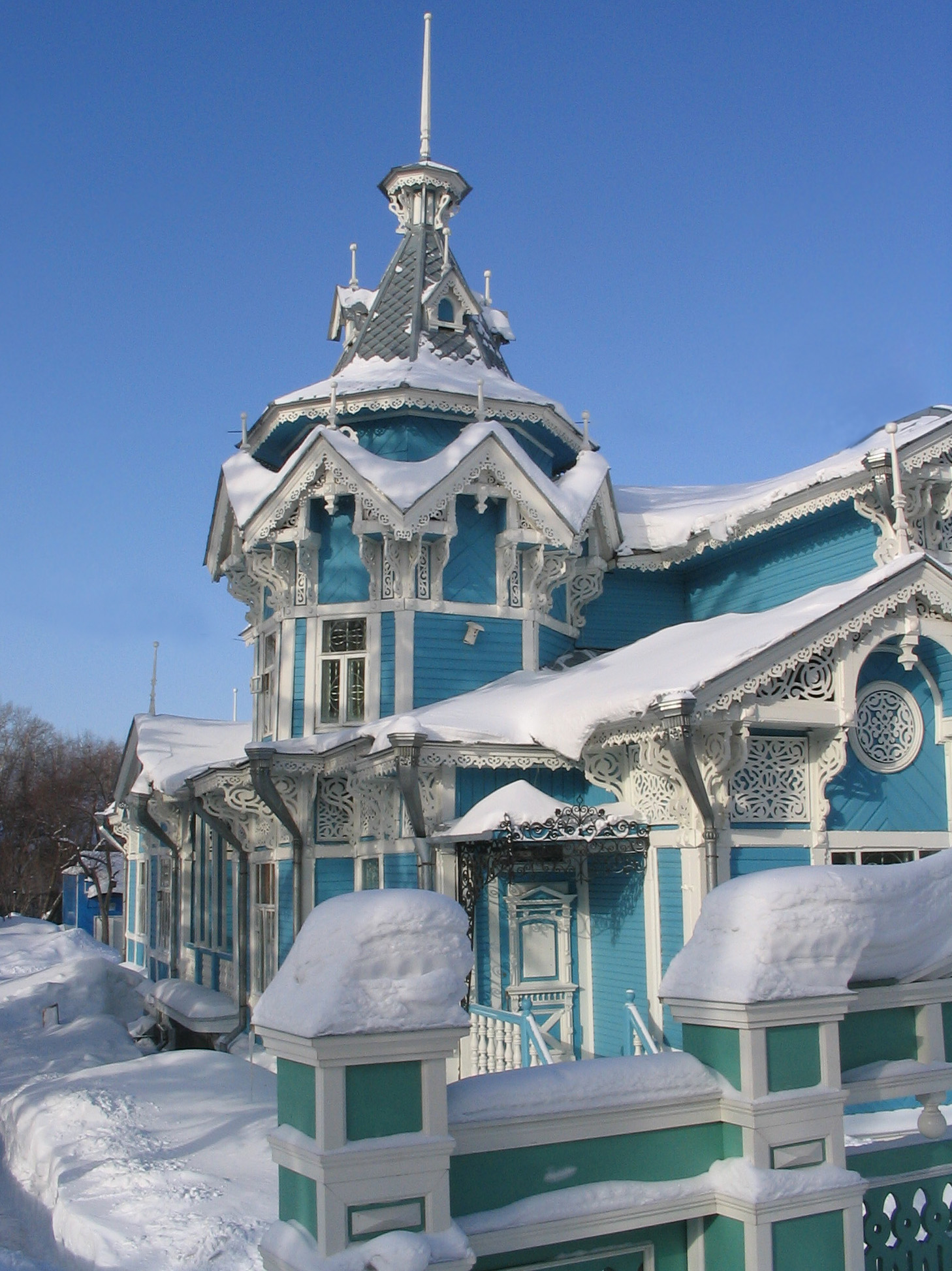 «Российско-немецкий дом» (ул. Красноармейская, д. 71, «Дом с шатром», дом купца Г. М. Голованова).